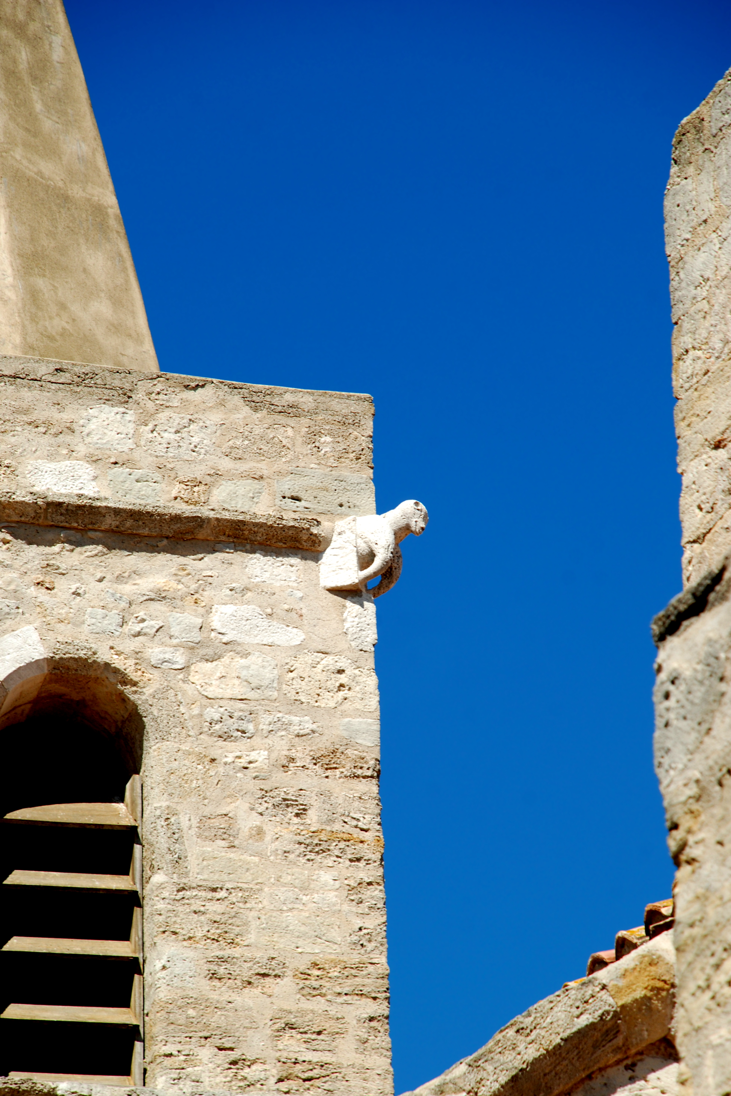 France - Languedoc - Aude - Église Saint-Jean l’Évangéliste d'Ouveillan